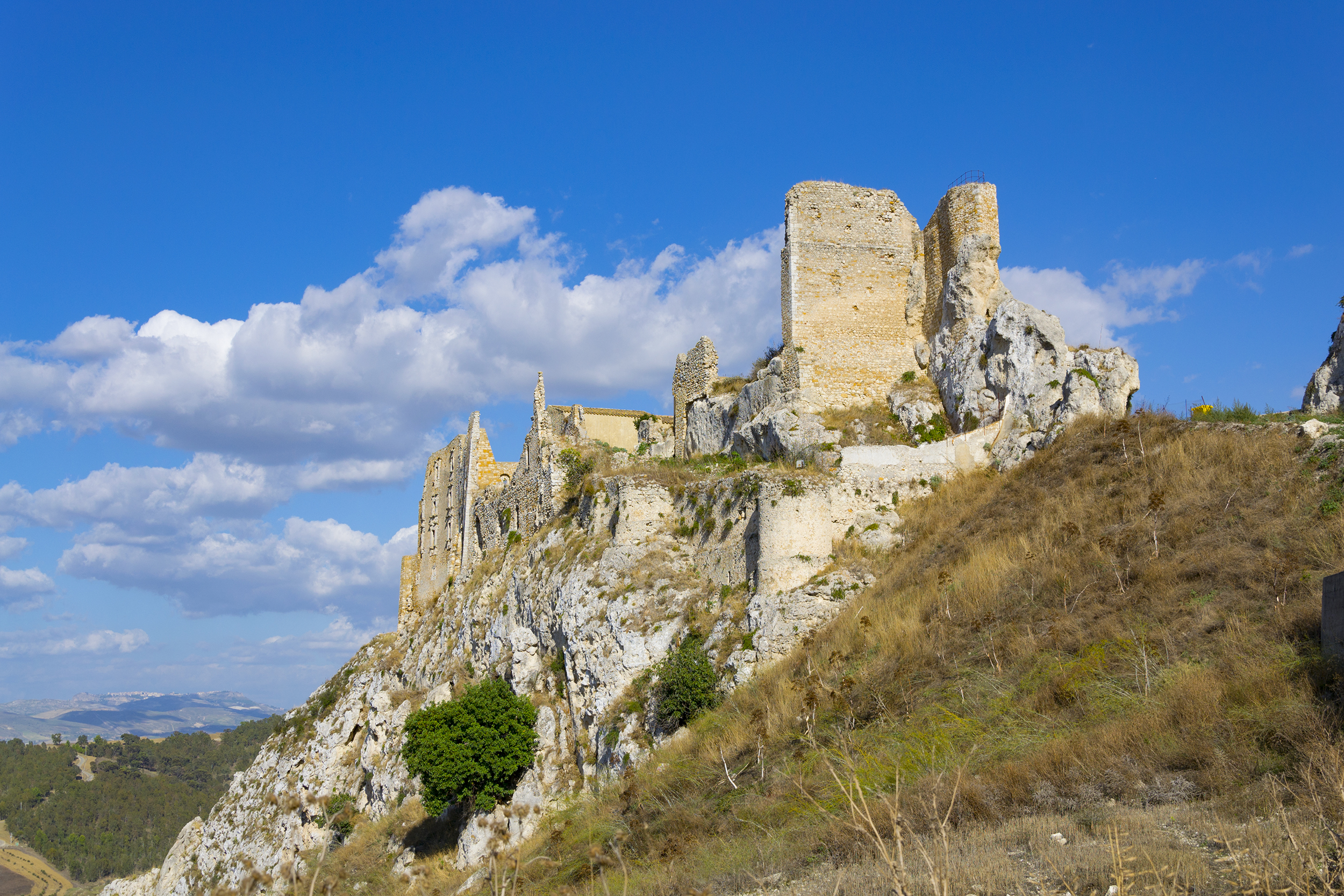 Castello Barresi This is a photo of a monument which is part of cultural heritage of Italy.